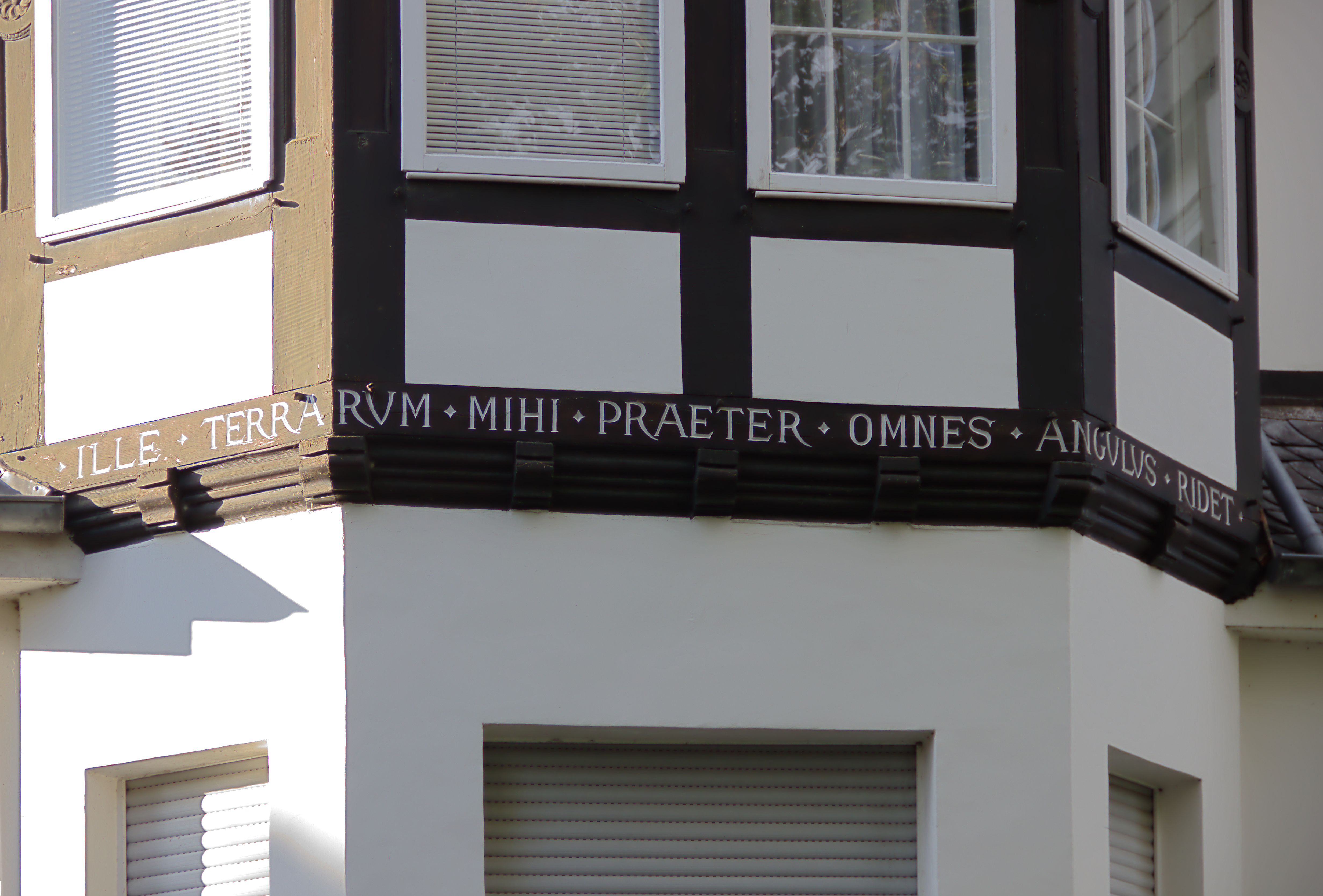 Denkmalgeschützte Villa, Schlossallee 19, Bonn-Mehlem; lateinischer Sinnspruch unter einem Fenstererker